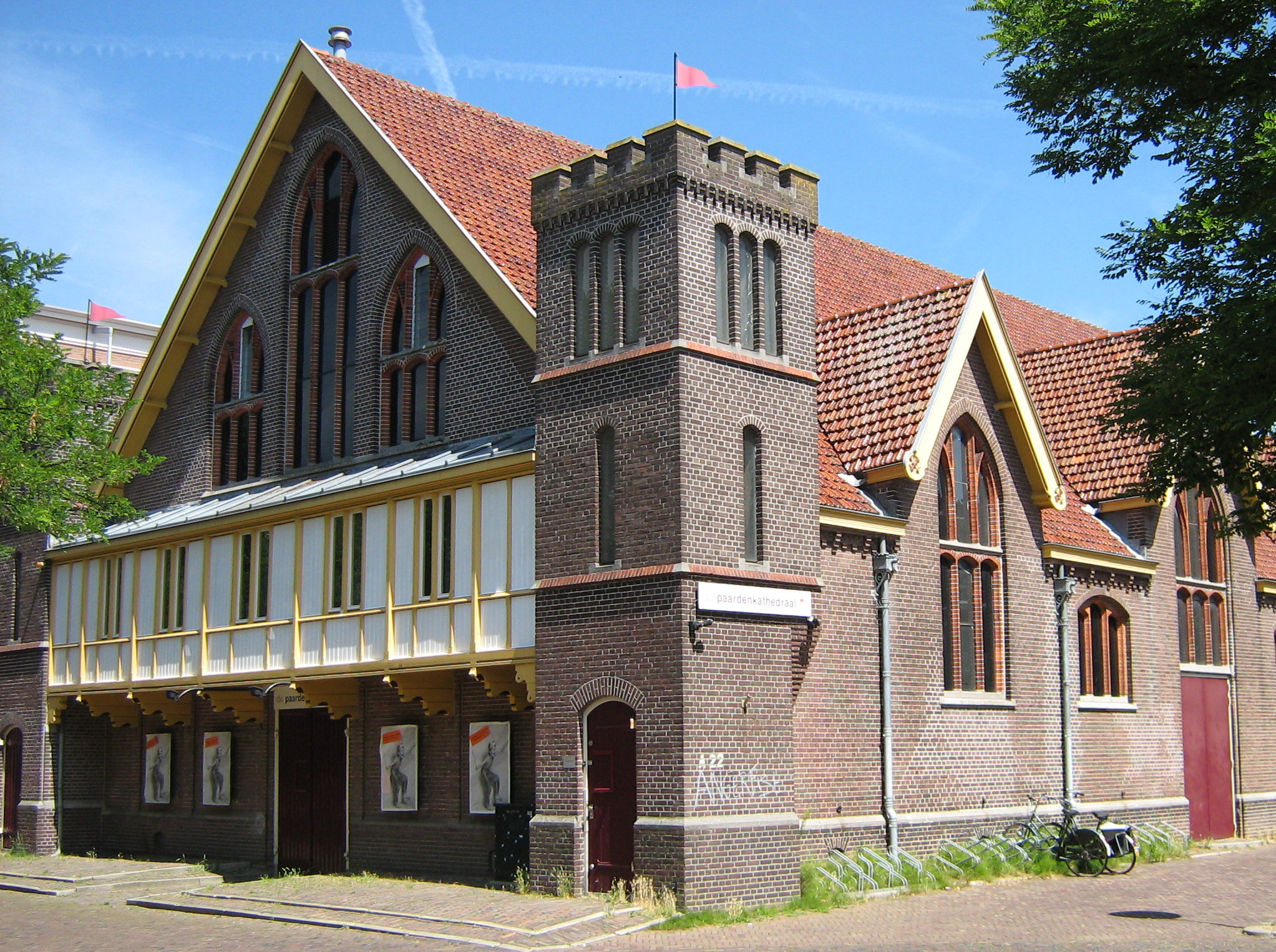 Voormalige manege van de Rijks Veeartsenijschool in Utrecht, heden de faculteit Diergeneeskunde van de Utrechtse universiteit. Het bouwwerk is een ontwerp van C.H. Peters, bouwjaar 1904-1905. Het gebouw staat ook wel bekend als de Paardenkathedraal en is herbestemd als theater.